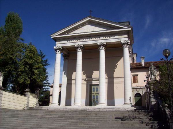 Udine (Friuli Venezia Giulia - Italy), Basilica Santuario della Beata Vergine delle Grazie